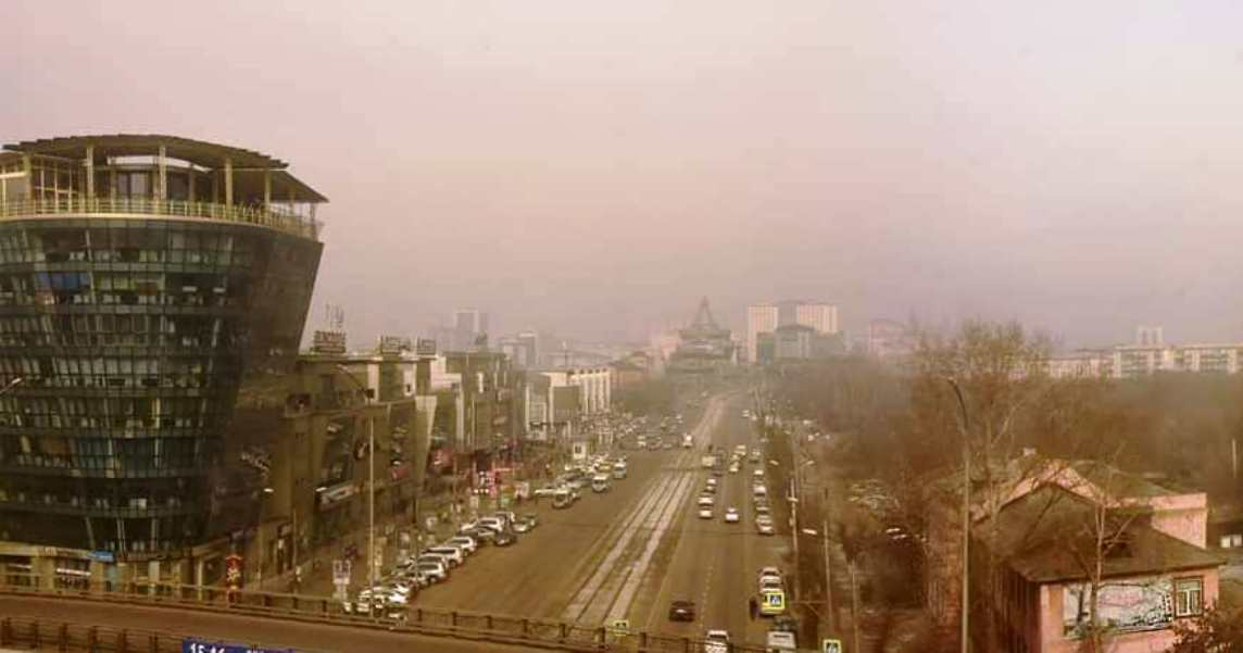 Улица Балтахинова. Вид с мостового перехода